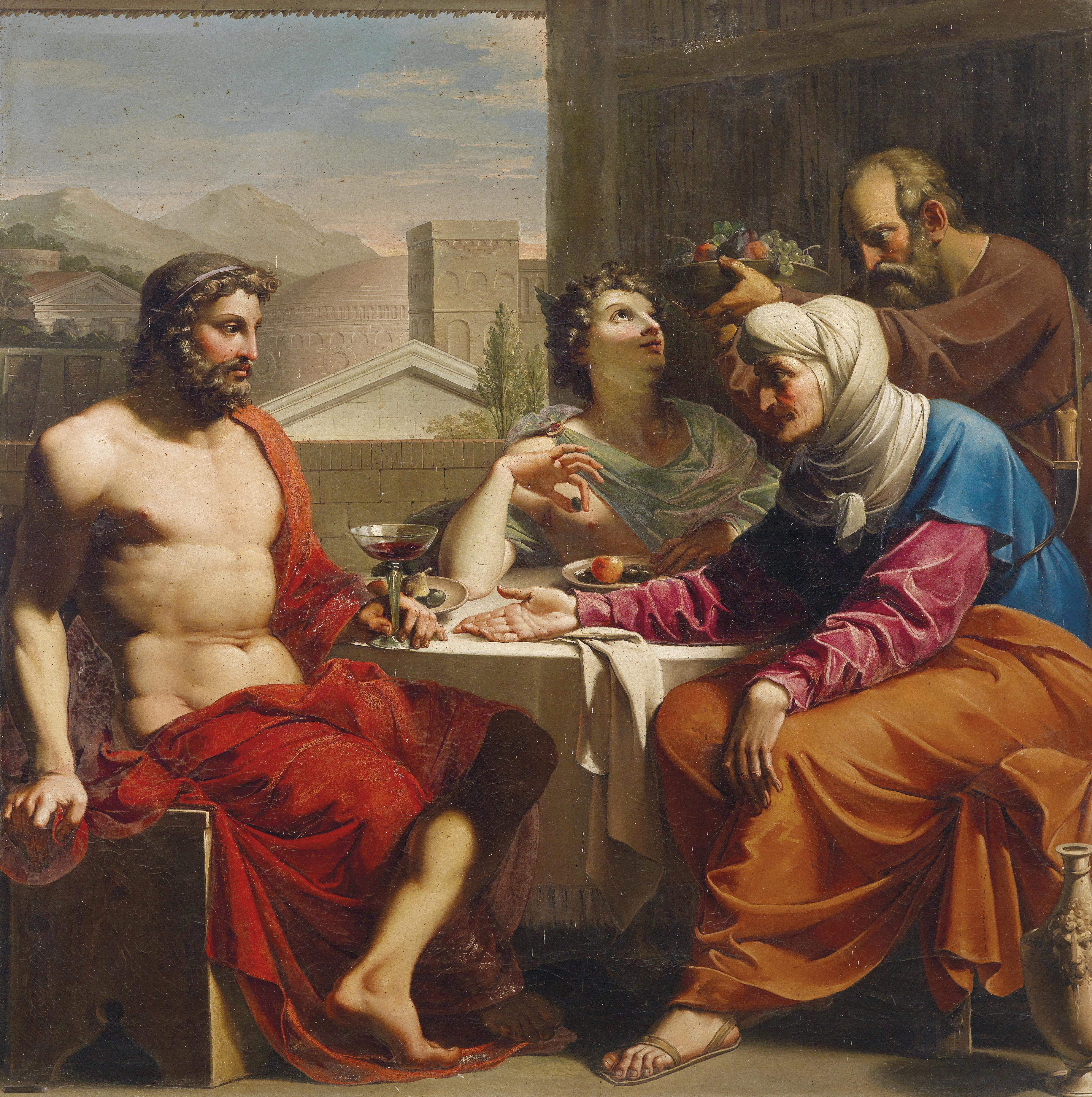 Jupiter und Merkur bei Philemon und Baucis